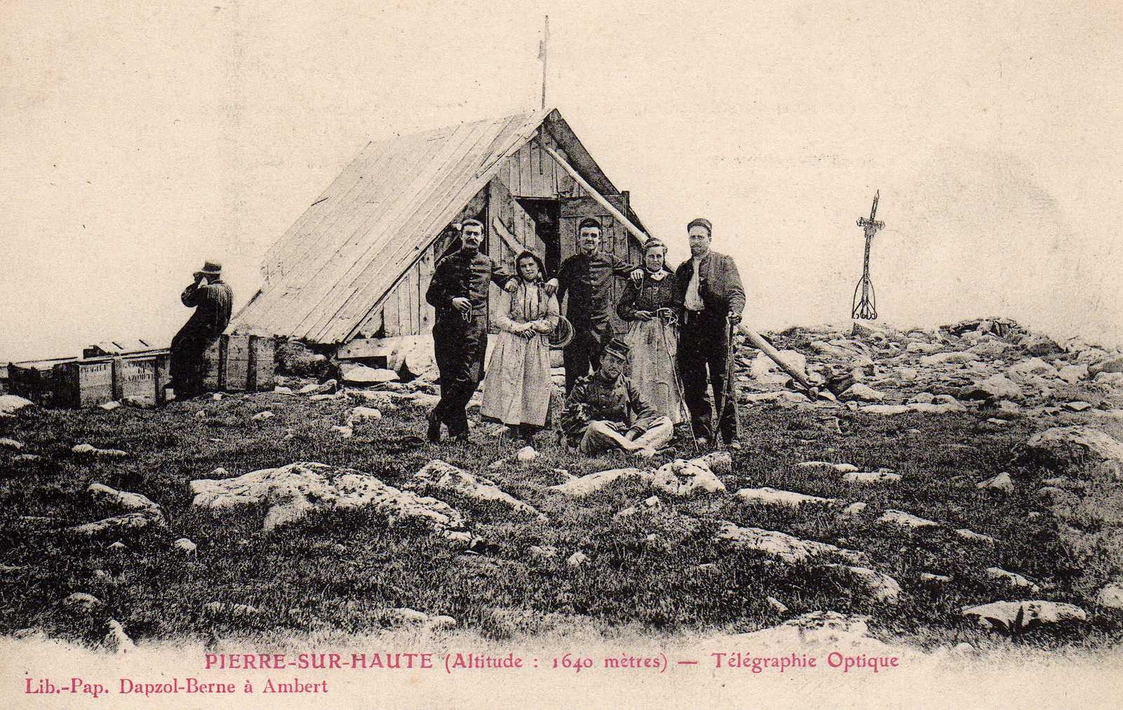 Station de télégraphe Chappe de Pierre-sur-Haute à ses tout débuts, à côté de la croix.